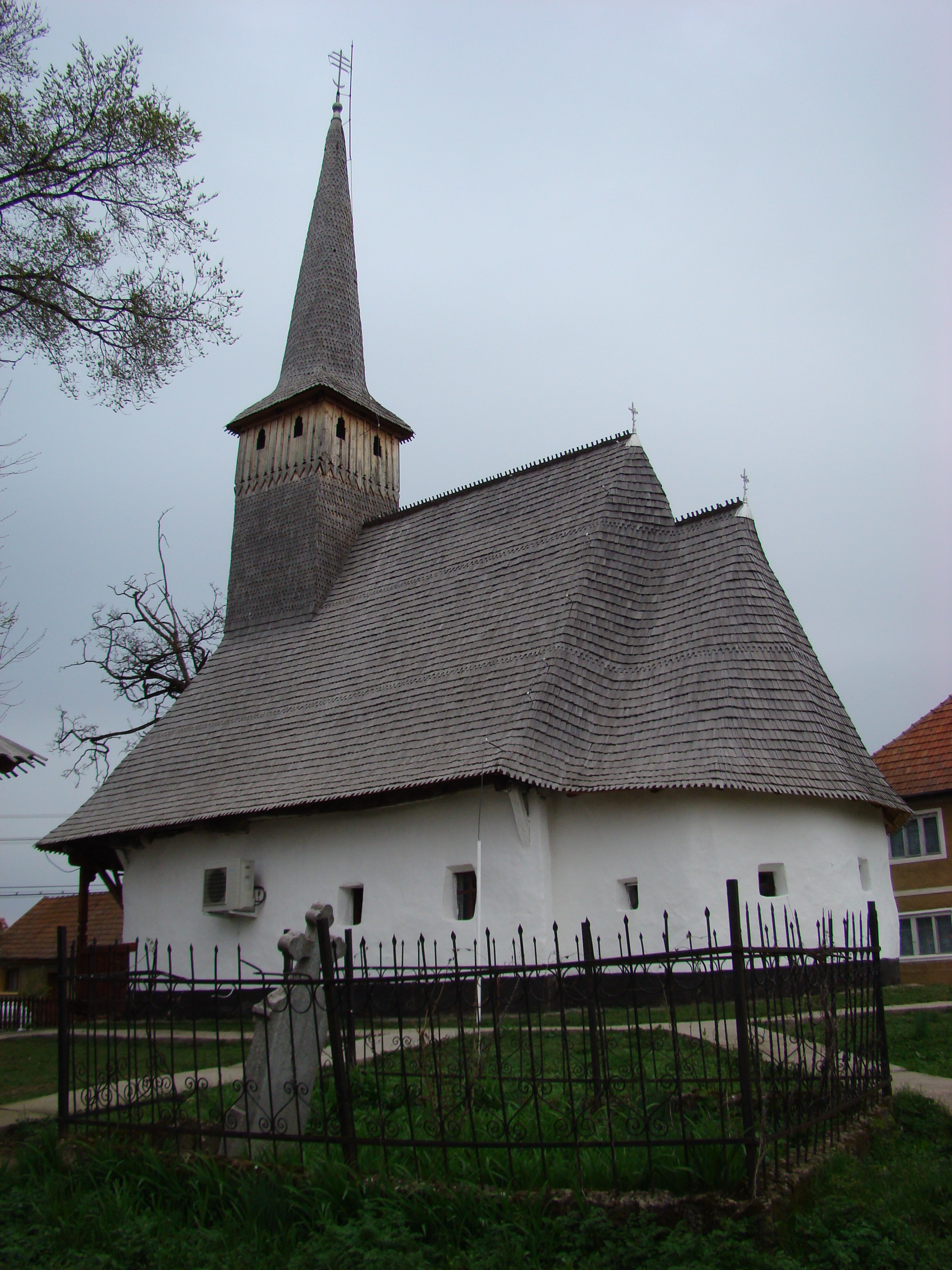 Biserica „Sfinții Arhangheli Mihail și Gavril” din Botean, județul Bihor